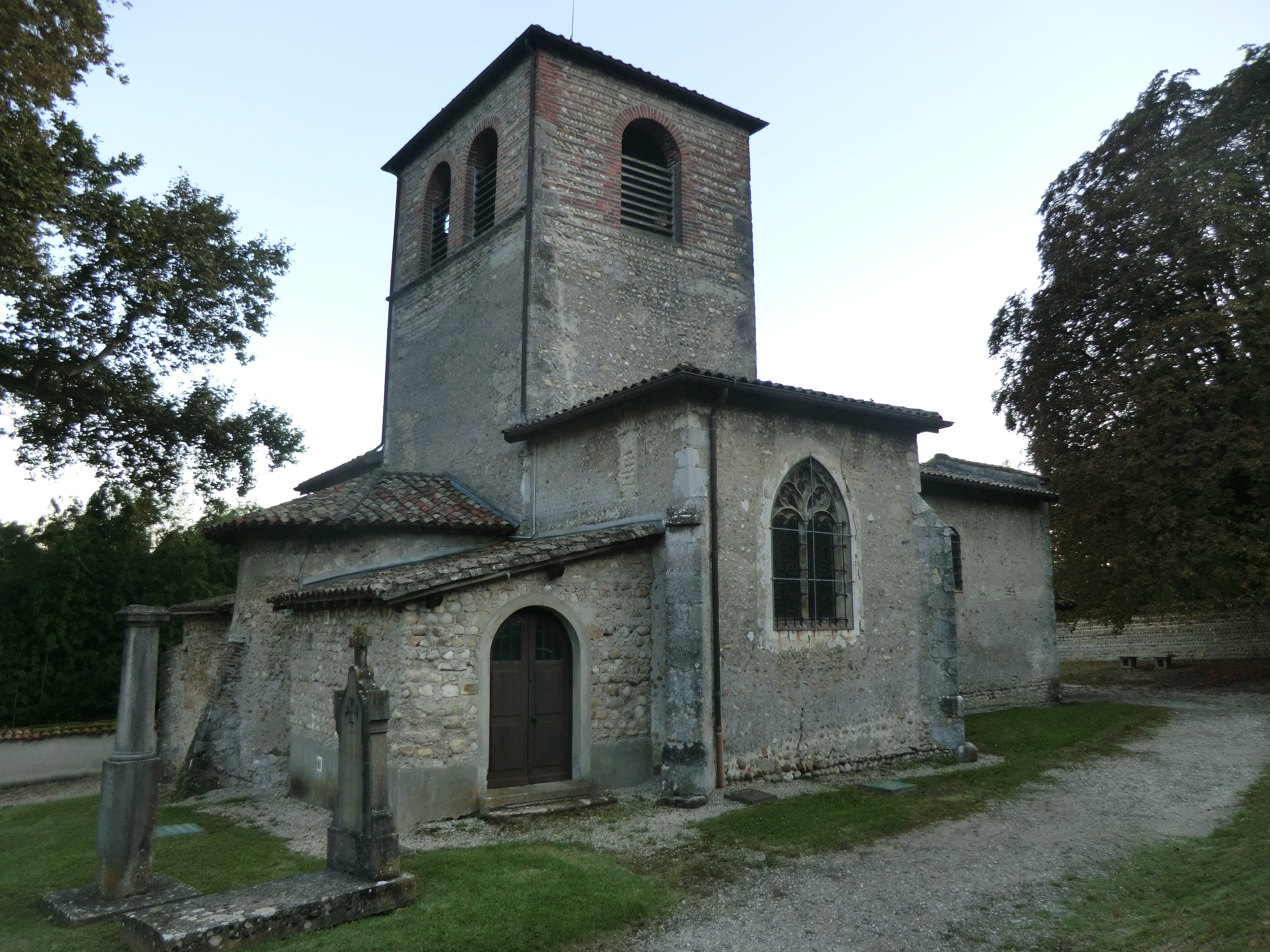 Église Saint-Maurice de Saint-Maurice-de-Beynost (angle sud-est).